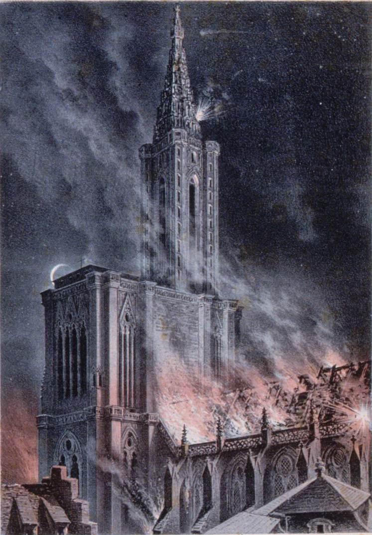 Lithographie du bombardement de la cathédrale de Strasbourg la nuit du 24 août 1870